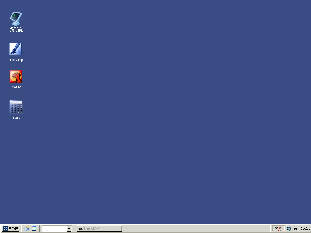 EDE (Equinox Desktop Environment) screenshot